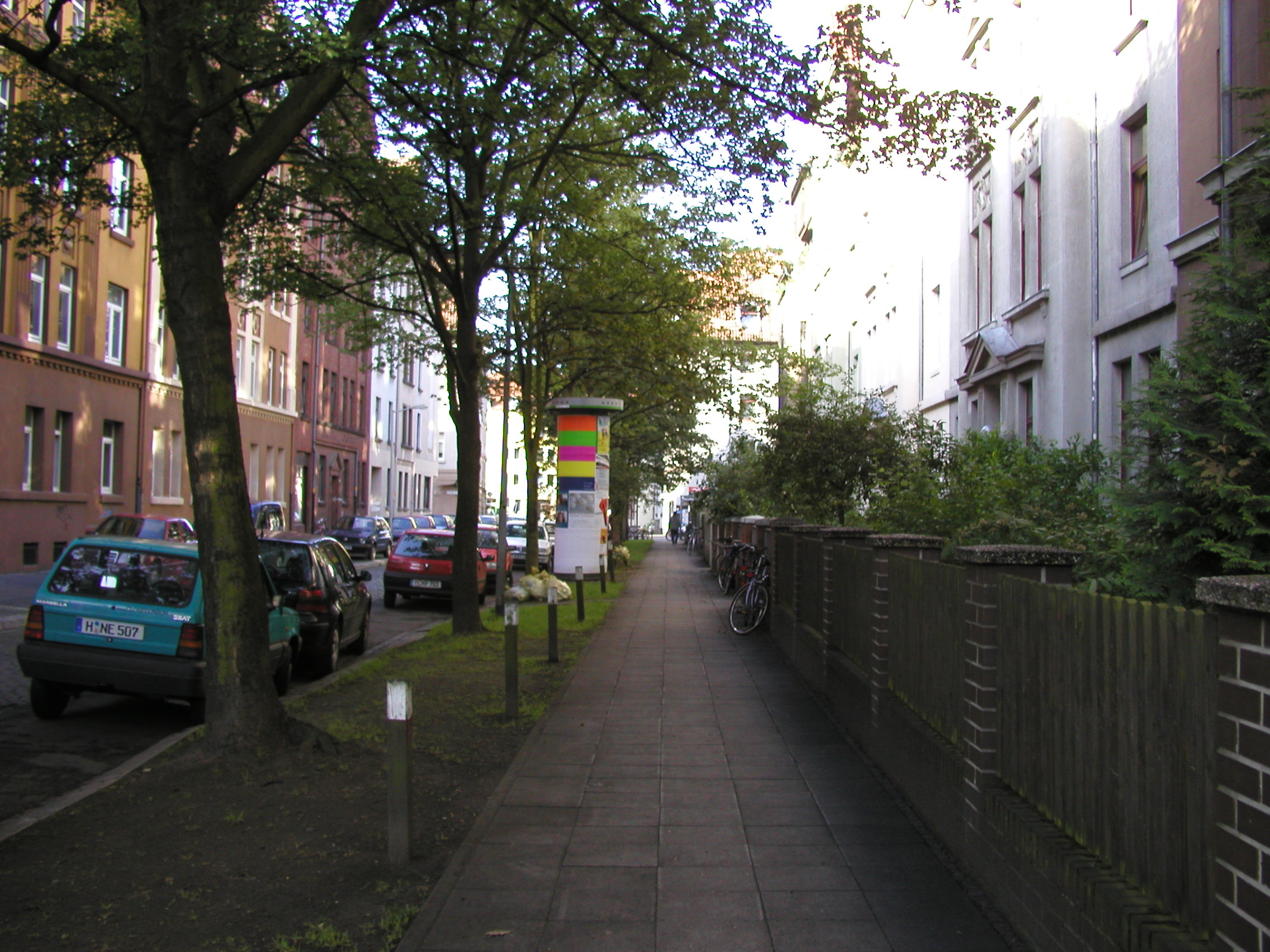 Erderstraße